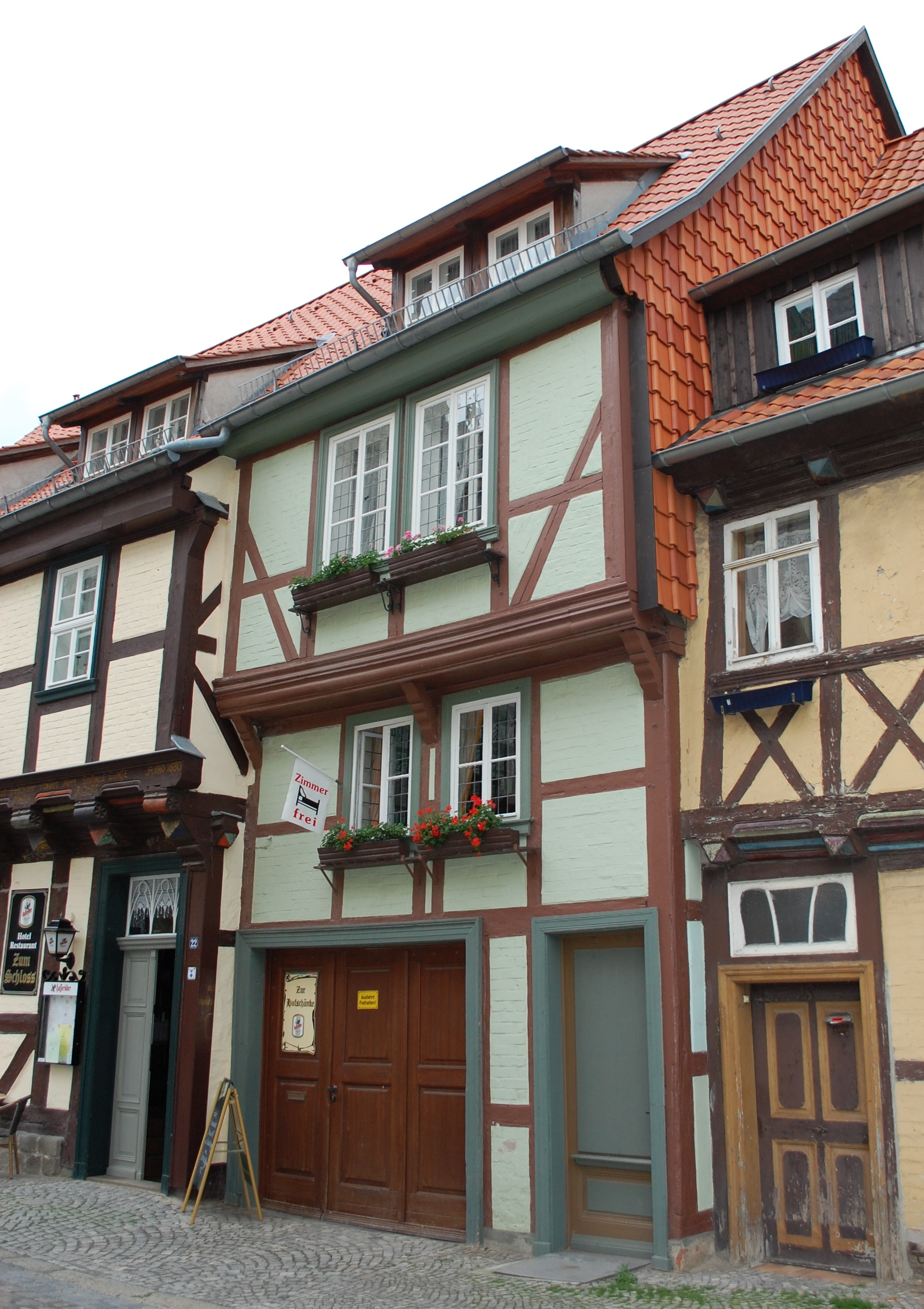 Haus Mühlenstraße 22 in Quedlinburg, westlich gelegenes Haus